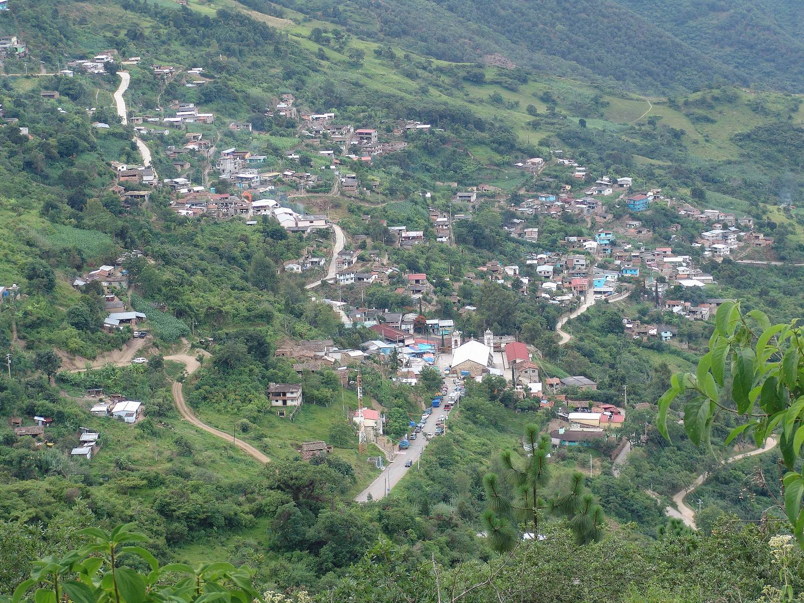 San Bartolomé Zoogocho